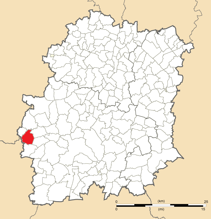 Carte de position d'Authon-la-Plaine en Essonne (91)